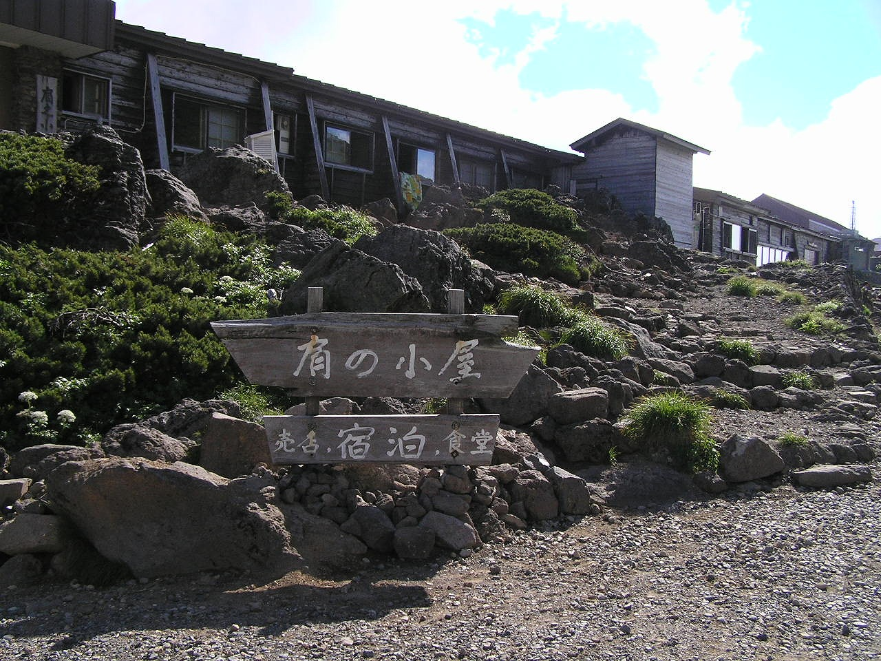 乗鞍岳肩の小屋